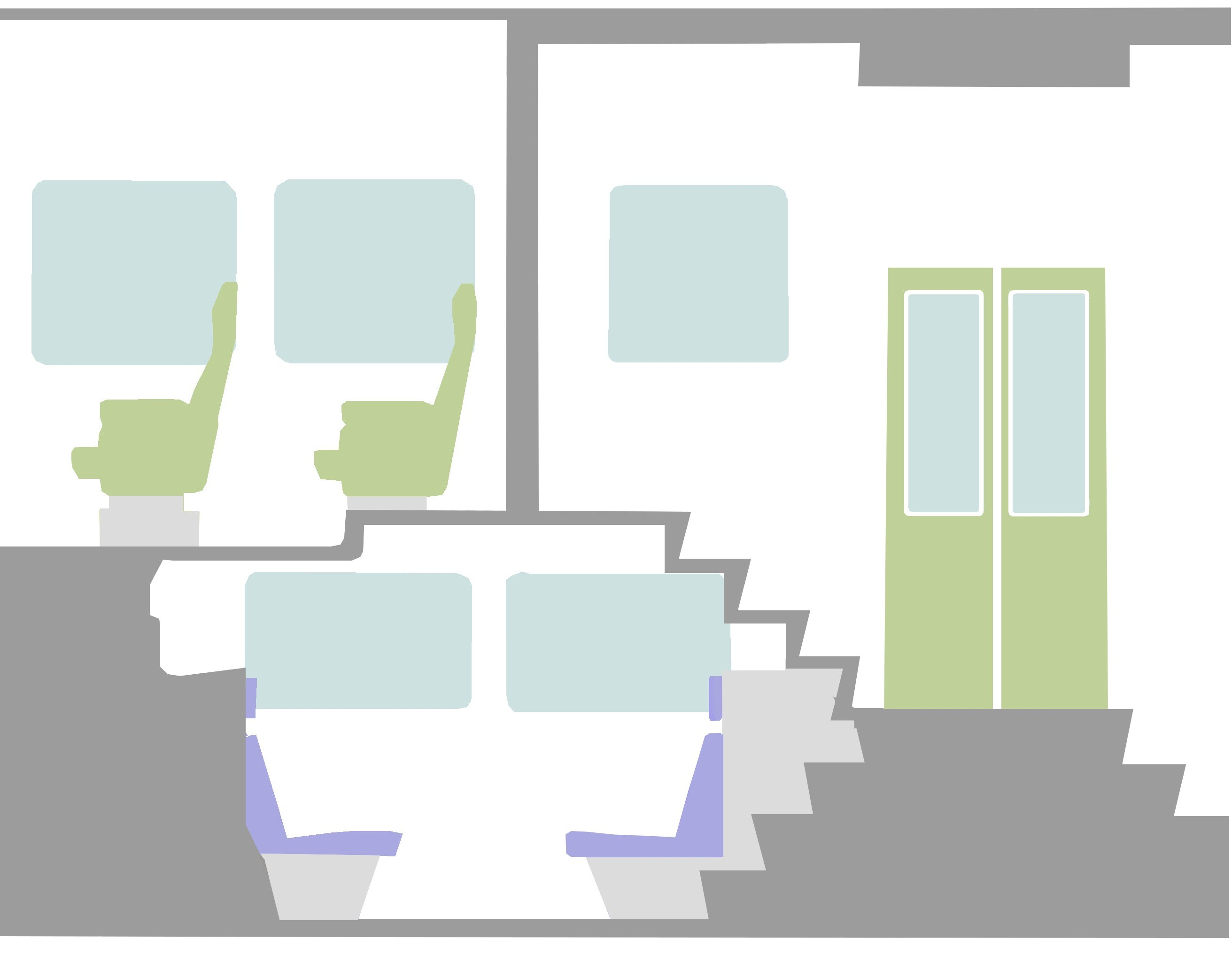 階上席の入口に位置する4座席が回転不可の理由を示す図